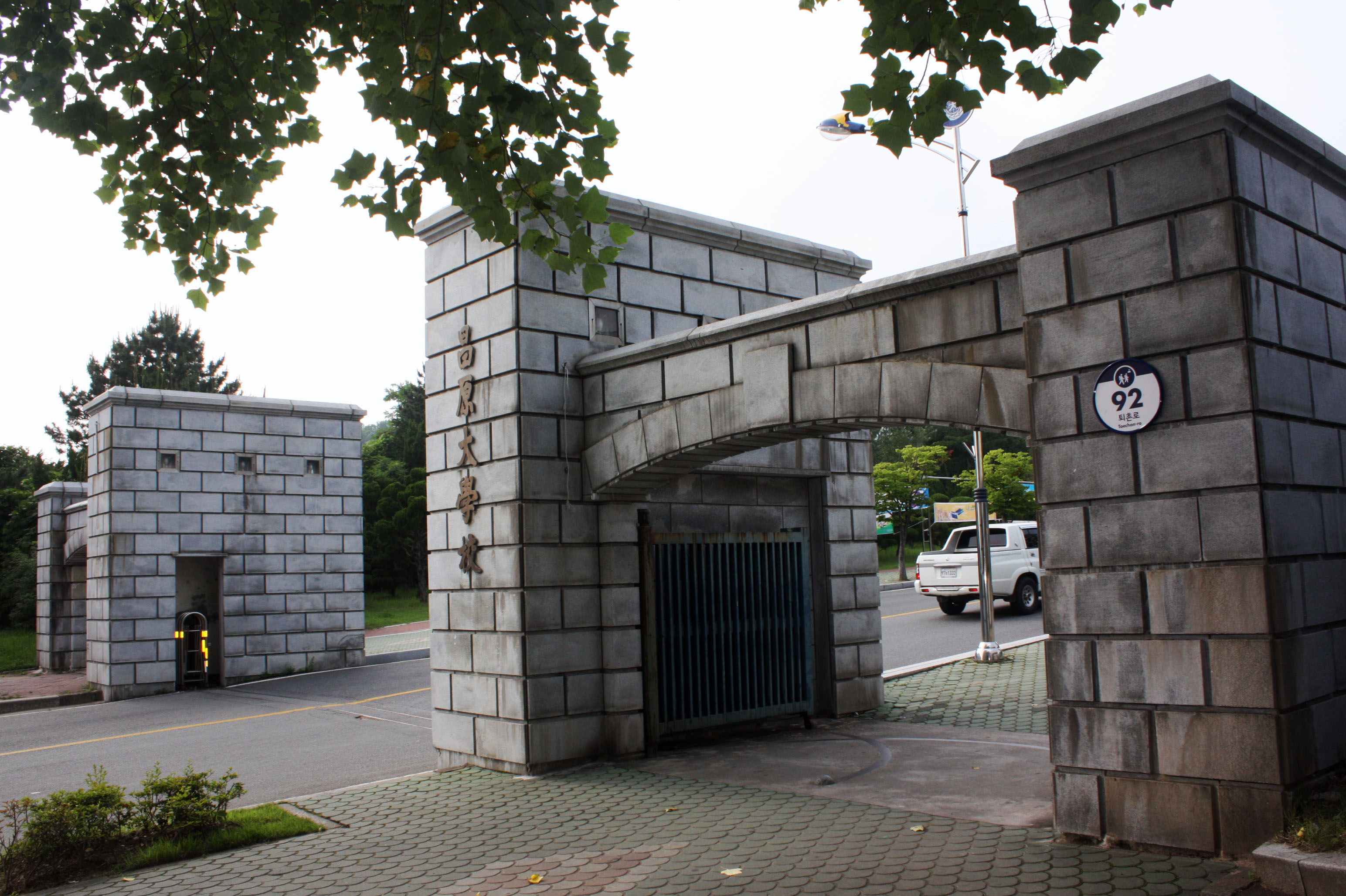 창원대학교 정문을 측면에서 찍은 사진입니다.